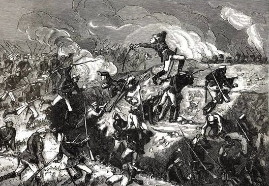 Геройската смърт на щабс-капитан Сергей Кушелев, командир на 10-та рота от Лейб-гвайрдейски Измайловски полк край Горни Дъбник. Руско-турска война 12.10.1877 г.